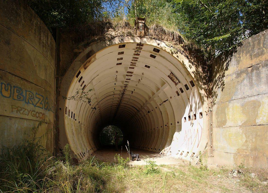 Zbliżenie tunelu obiektu 3003, kiedyś zamykanego ogromnymi, stalowymi wrotami. Zastanawiał mnie ogrom instalacji wewnętrznych, których nędzne ślady jeszcze pozostają. Całość czyni dość mocne wrażenie.